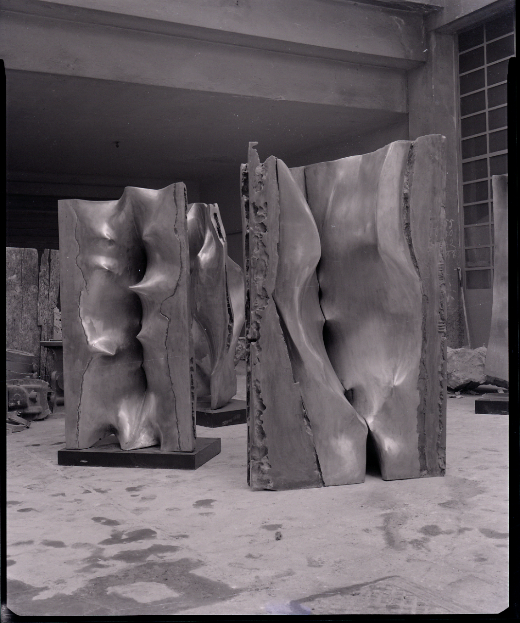 Servizio fotografico : Vimercate, 1965 / Paolo Monti. - Buste: 8, Fototipi: 8 : Negativo b/n, gelatina bromuro d'argento/ pellicola ; 10x12. - ((Serie costituita da 8 buste sciolte di negativi identificati con i nn.: 10347, 10348, 10349, 10350, 10351, 10352, 10353, 10354. - , presso Archivio Paolo Monti. - Fonte: Agenda di Paolo Monti: Monti/ 2/ 6 giugno 1964 - 31 marzo 1966/ 8194-12420 (1964-1966)